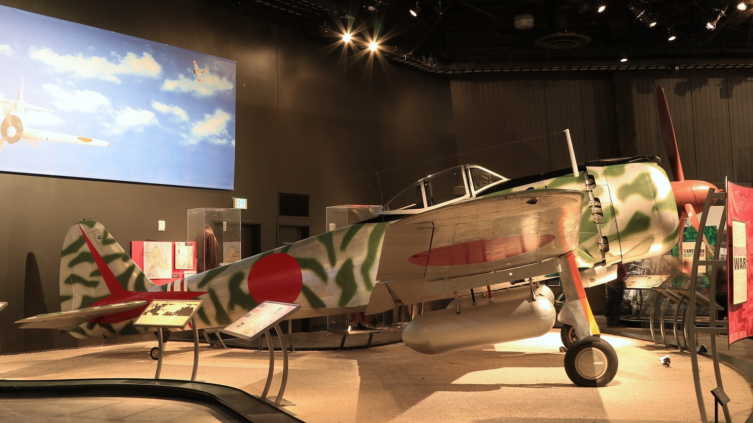 中島飛行機 / 一式戦闘機 三型甲 / Museum of Flight 所蔵 / 2015年9月19日撮影